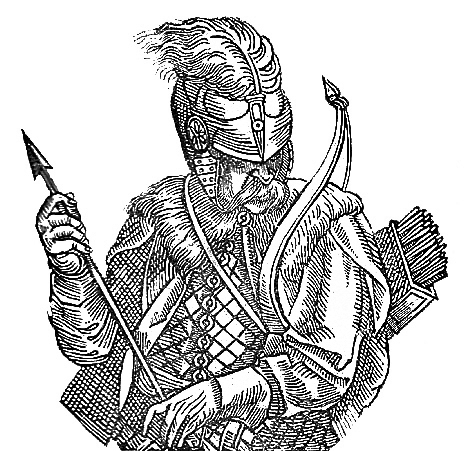 Lithuanian Grand Duke Švitrigaila